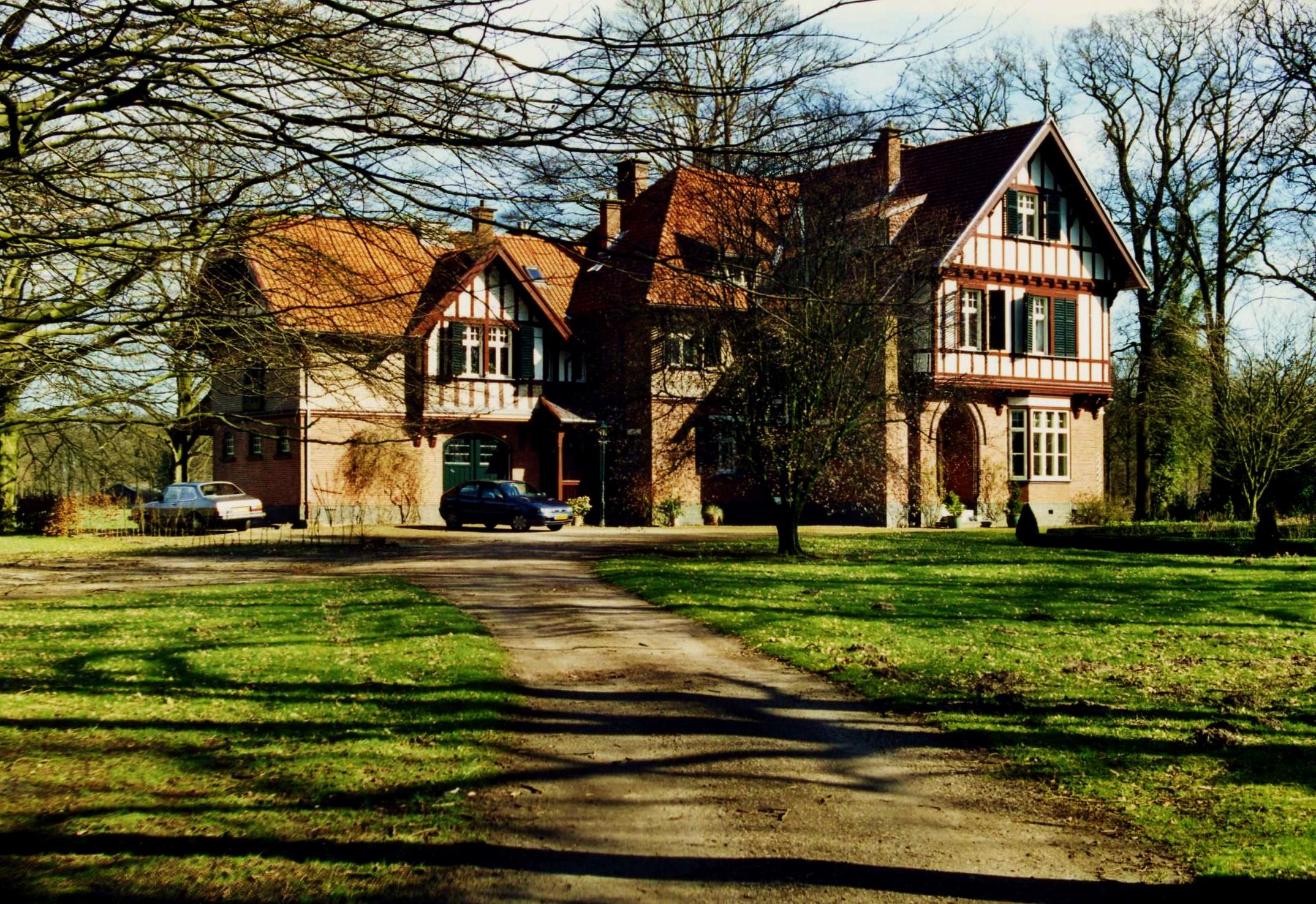 Huis Peckedam te Diepenheim.